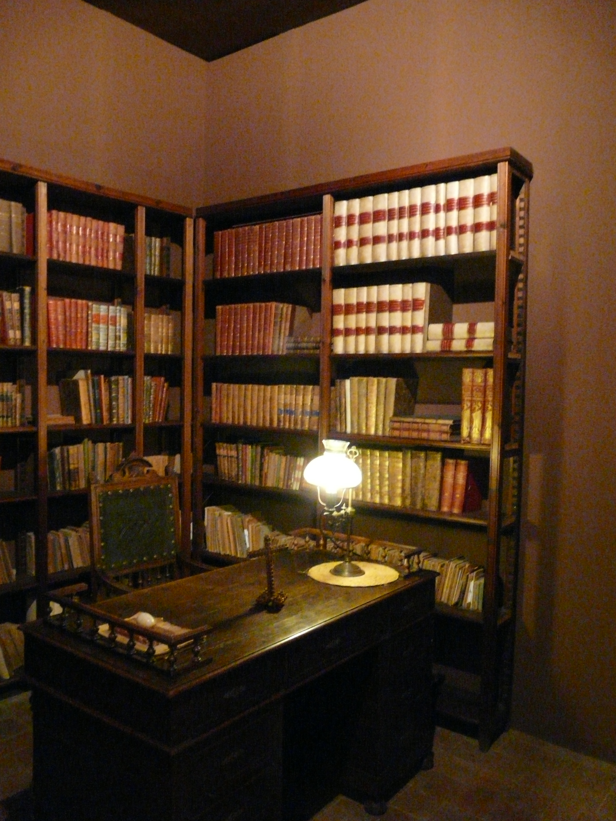 Vil·la Joana (Barcelona) Object location41° 25′ 11.24″ N, 2° 05′ 59.6″ E